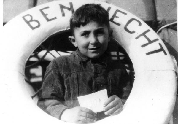 צעיר מעפילי האוניה 'בן הכט' מביט מתוך גלגל ההצלה.